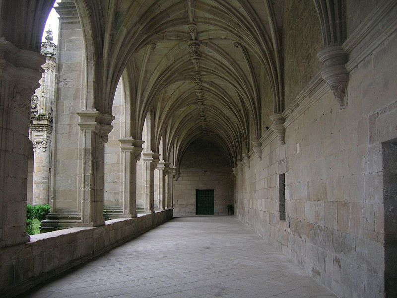 Description Galería do Claustro procesional do mosteiro de San Salvador de Celanova Date29 May 2007Source Antonio Gil Martínez. FREECATPermission (Reusing this file) cc-by-2.0 Galería do Claustro procesional do mosteiro de San Salvador de Celanova